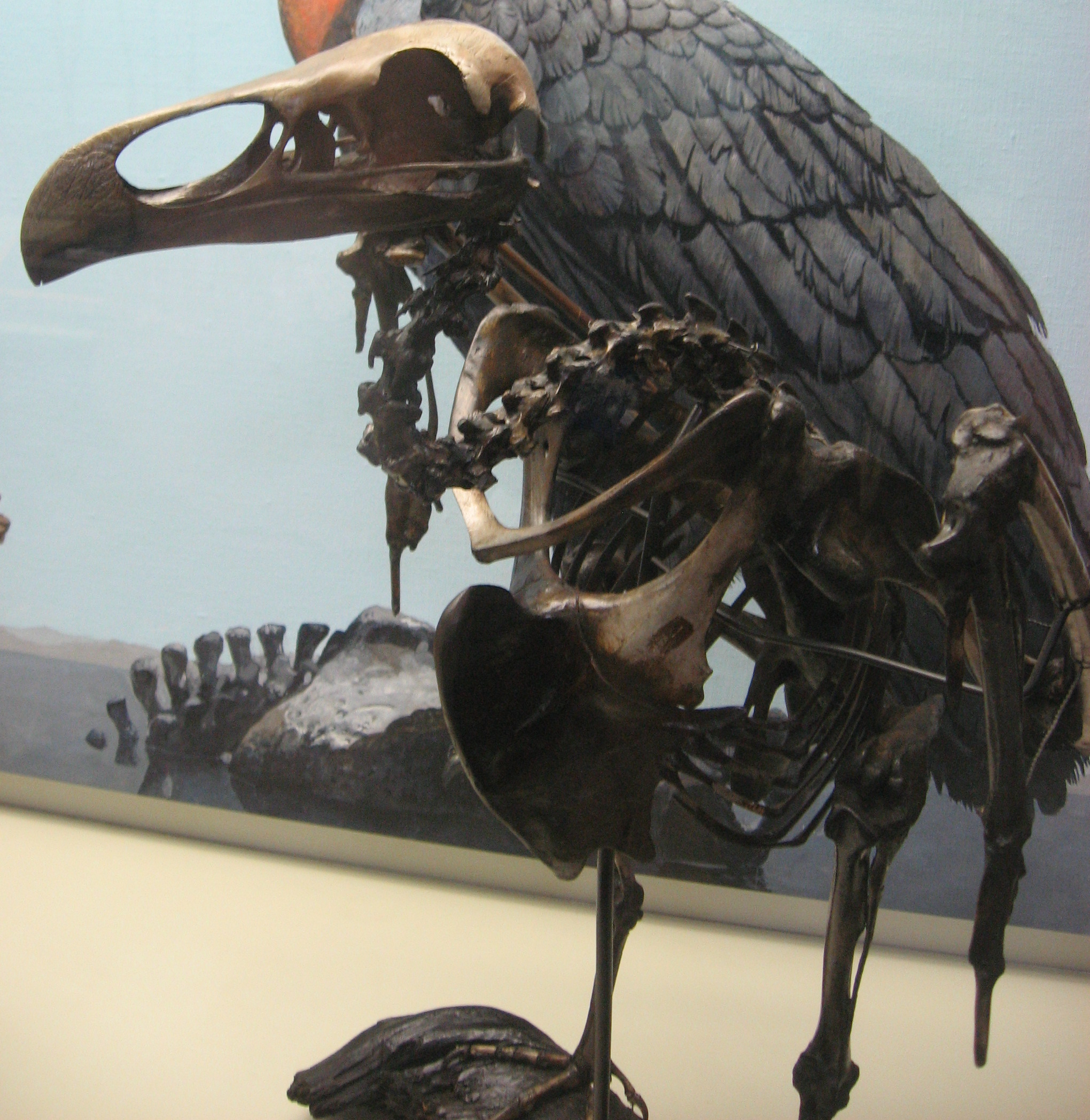 La Brea Tar Pits 2009